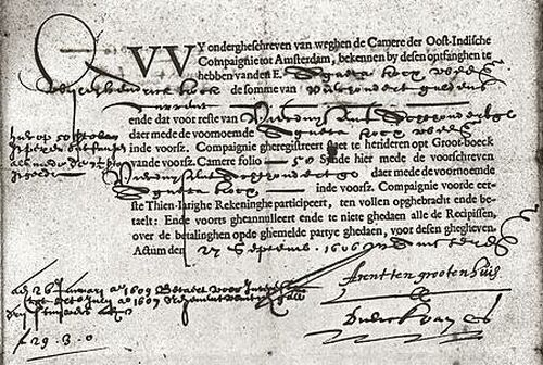 Nederlandse Verenigde Oost-Indische Compagnie (VOC) Betalingsbewijs #99, termijn van een aandeel; uitgegeven door de Camere Amsterdam, akte van 27 september 1606. Originele handtekeningen: Arent ten Grotenhuys en Dirck van Os, stichters van de Compagnie van Verre en vanaf 1602 bewindhebbers van de VOC-Kamer Amsterdam [1]